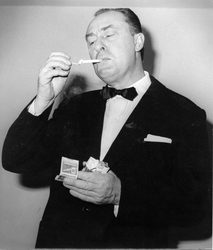 Foto di mio padre, probabilmente scattata durante una prima rappresentazione negli anni 60